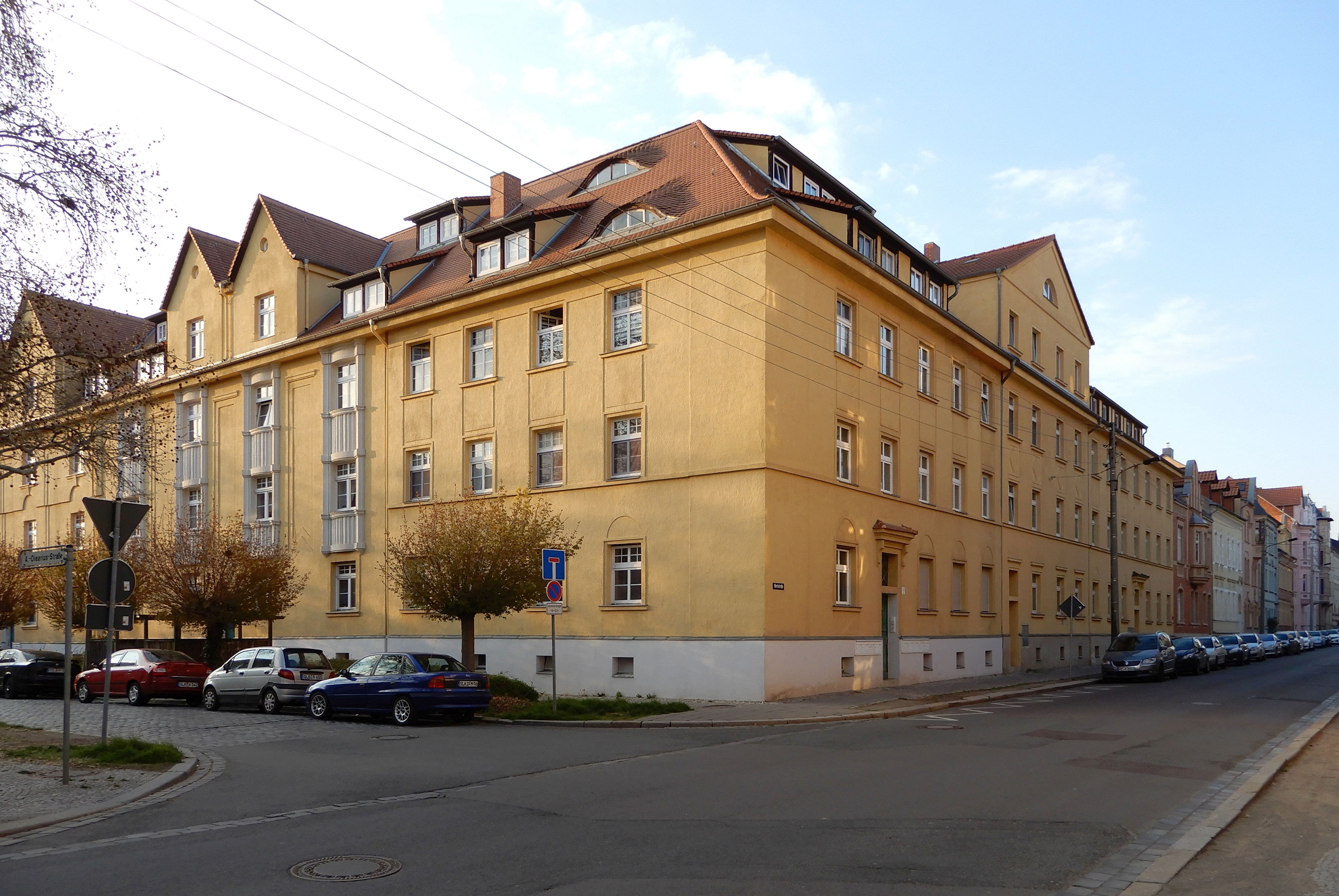 Gebäude Worthstraße 23-1 in Aschersleben